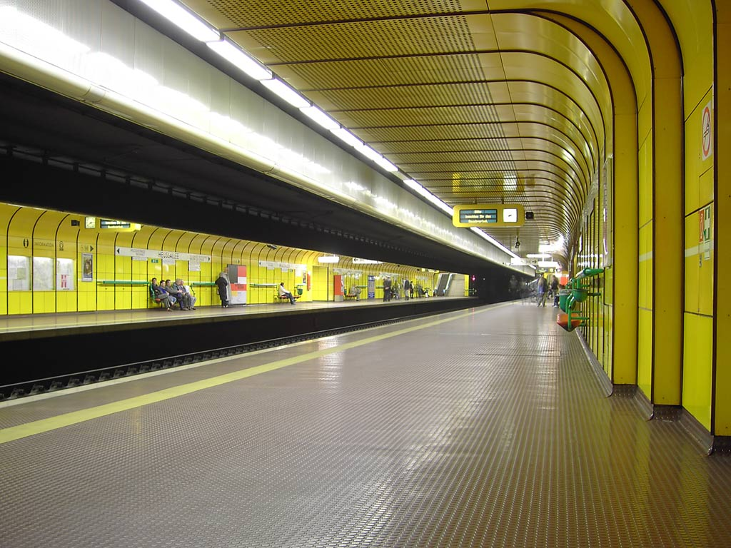 Stadtbahnhaltestelle Heussallee/Museumsmeile in Bonn